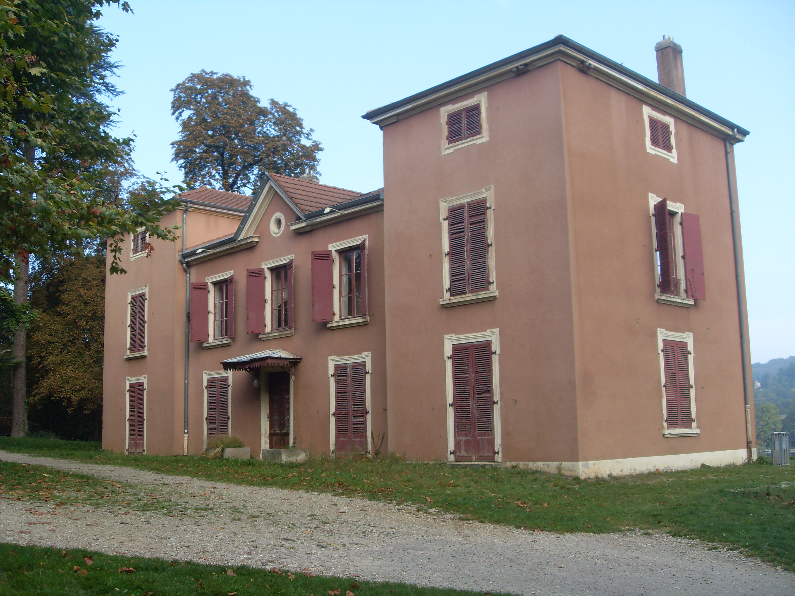 Maison Levrat, au parc de Fallavier (ou parc Levrat) - Isère